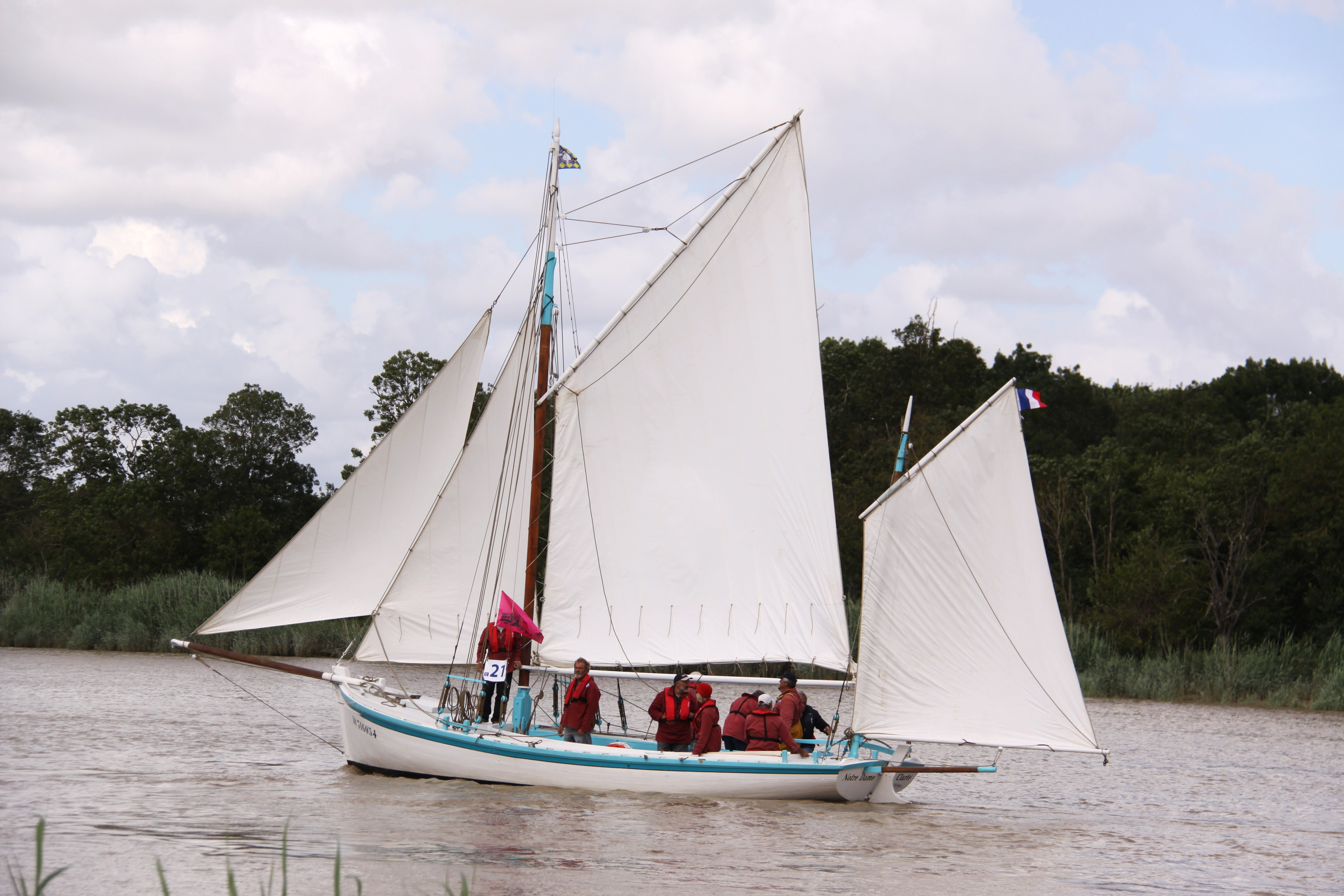 Le sloop mytilicole « Notre Dame de la Clarté » en train de remonter la Charente, à Rochefort-sur-Mer, durant la parade nautique de vieux gréements lors de la fête de la mise à l' eau de la frégate "L' Hermione" (réplique de "L' Hermione" de 1779). Le « Notre Dame de la Clarté » a été construit en 1955 au chantier Durand à Marans (charente Maritime). Il a été utilisé pour la myticulture mais aussi pour la pêche. Les caractérisques de ce bateau sont les suivantes: longueur HT: 9,53 mètres, longueur à la flottaison; 8,30 mètres, largeur: 3,12 mètres, tirant d' eau: 0,80-1,80 mètre, jauge brute: 4 tx 24, surface de voilure: 65,84 m2, gréement: cotre aurique à tapecul, yawl. Restauration complète de 2008 à 2011. Immatriculation: IO 316054. Rochefort-sur-Mer, Charente Maritime, France.